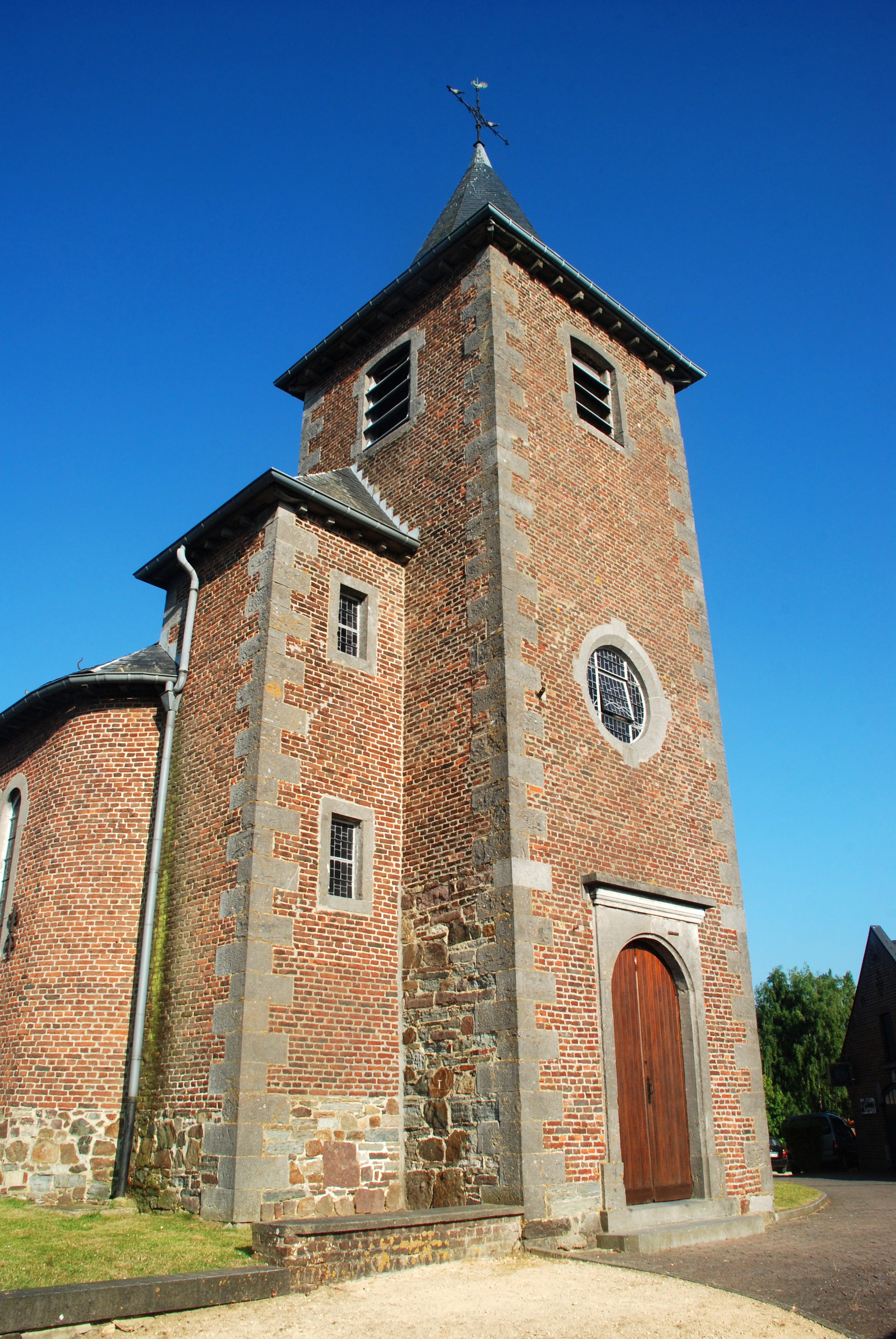 Belgique - Brabant wallon - Chastre - Cortil-Noirmont - Église Saint-Pierre de Noirmont